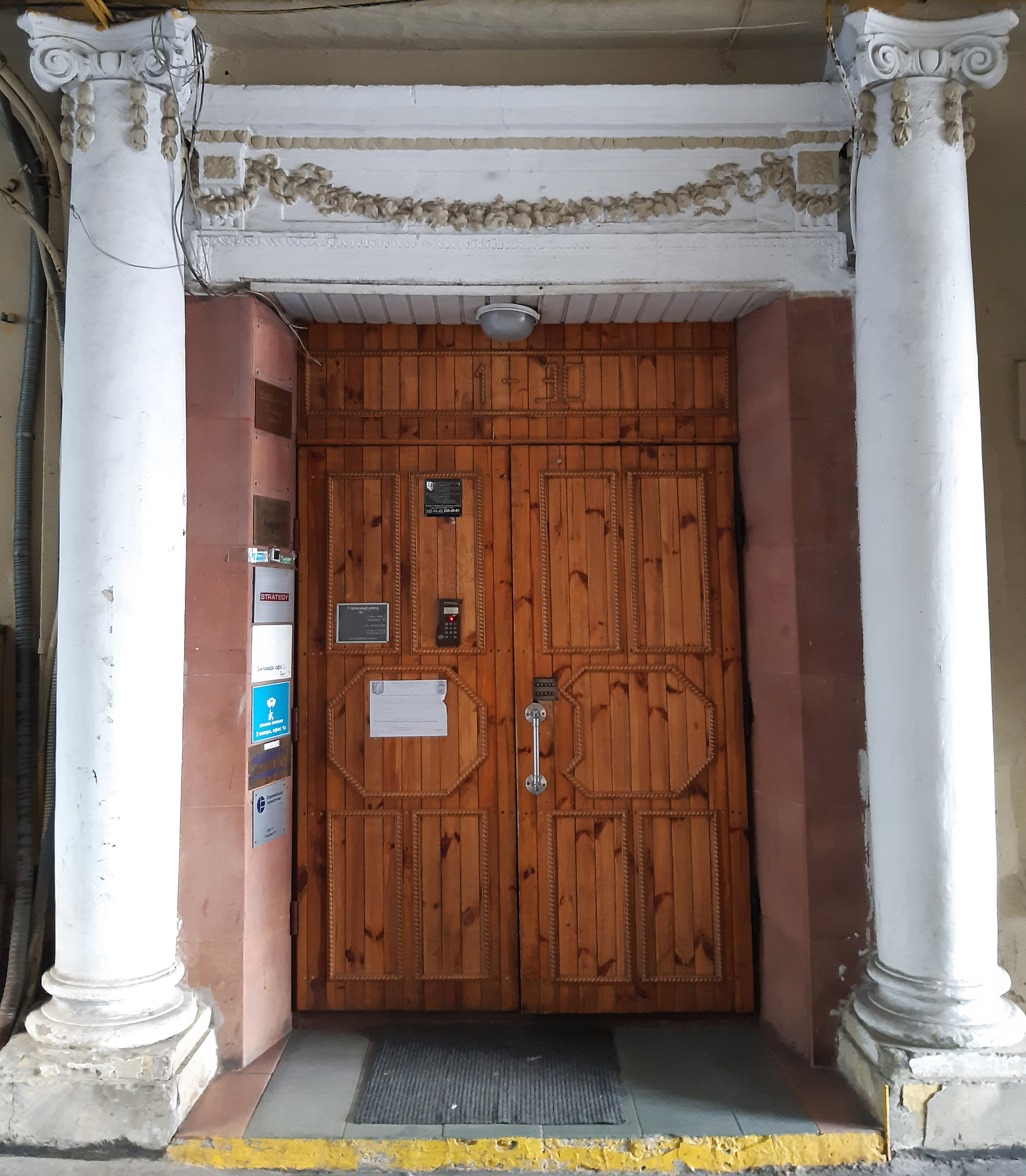 Портал у проїзді. Будинок Крушевської, Київ, вул. Б. Хмельницького, 32